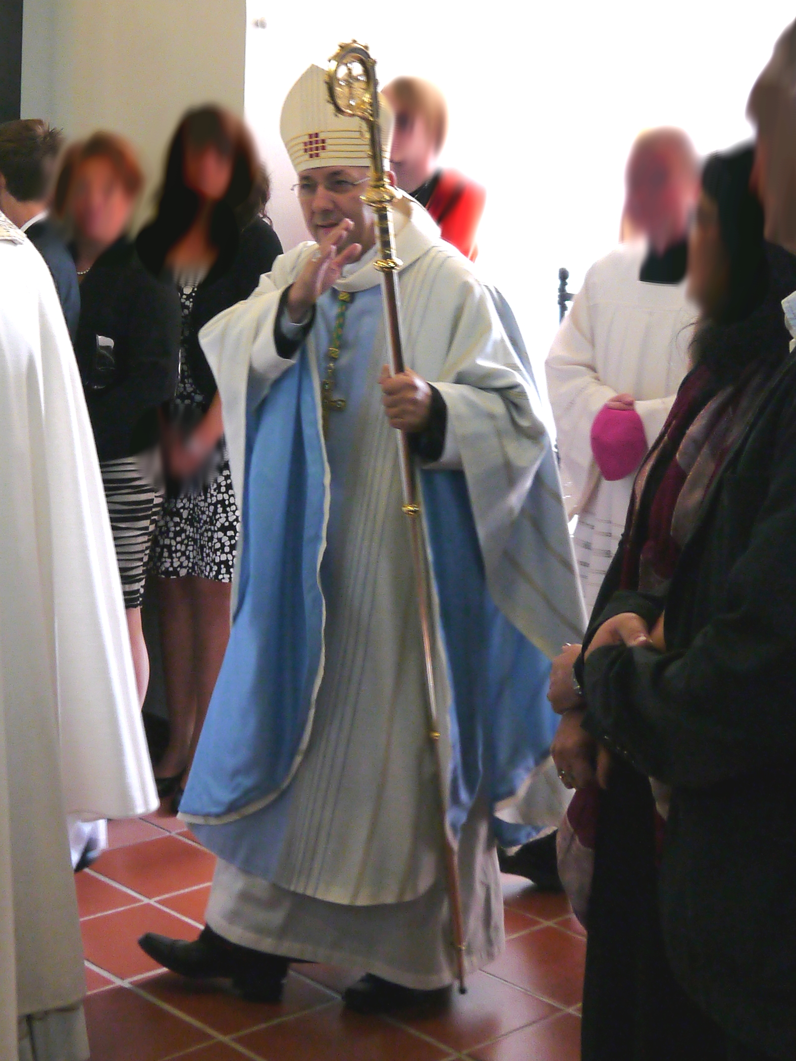 Bischof Wolfgang Ipolt bei der Firmfeier in